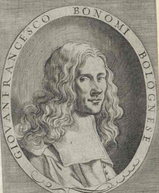 Par qui arriva la pomme de terre ..